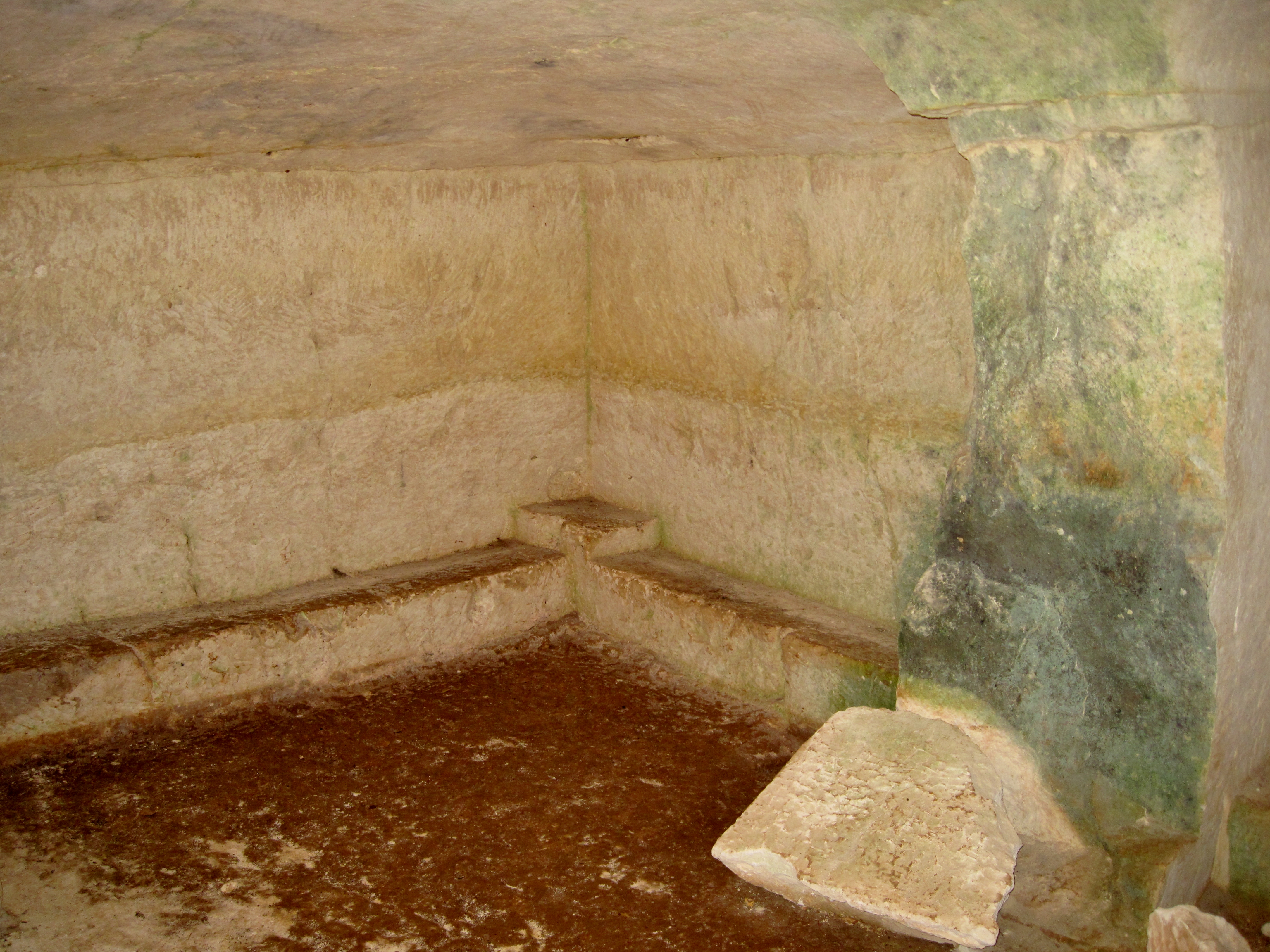 Grabanlage auf dem spätminoischen Friedhof von Armeni, Präfektur Rethymno, Kreta, Griechenland